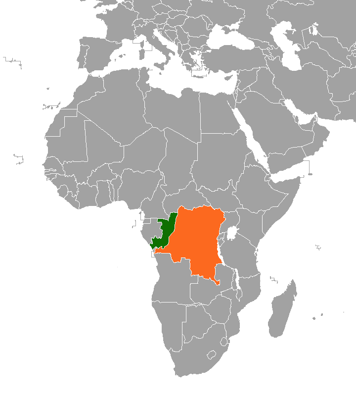 Localización del Congo y la República Democrática del Congo.